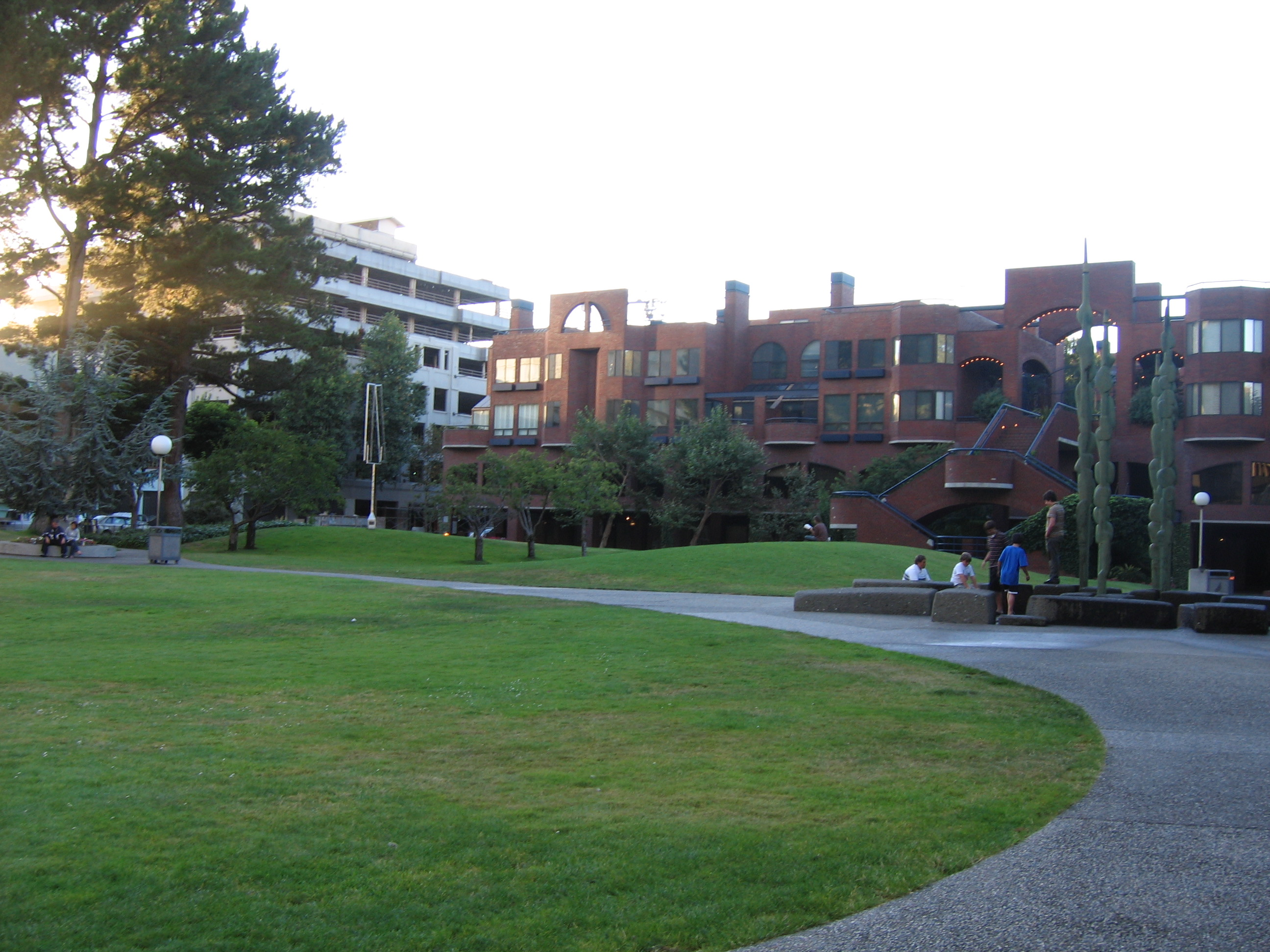 Гледка от градският парк Сидни Г. Уолтън Скуеър в Сан Франциско.